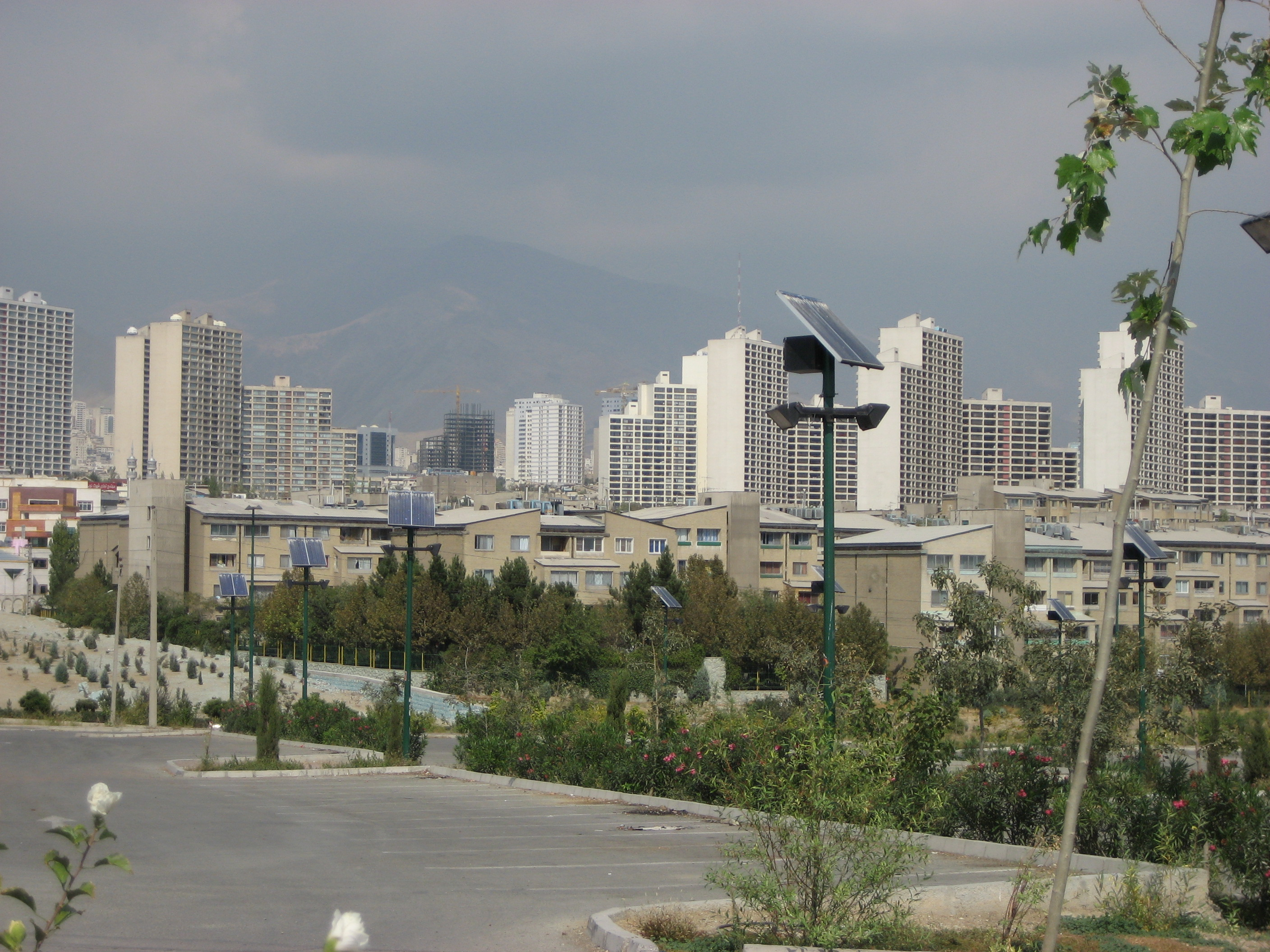 Shahrah-e Gharb district, Tehran